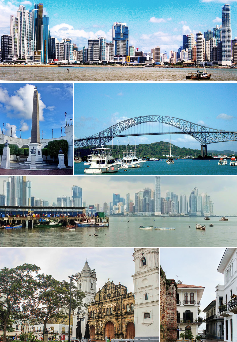 Ciudad de Panamá